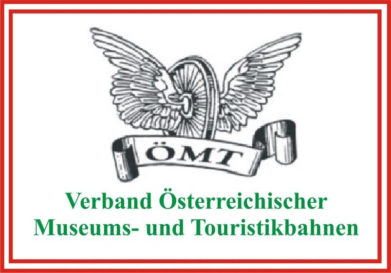 Logo des ÖMT